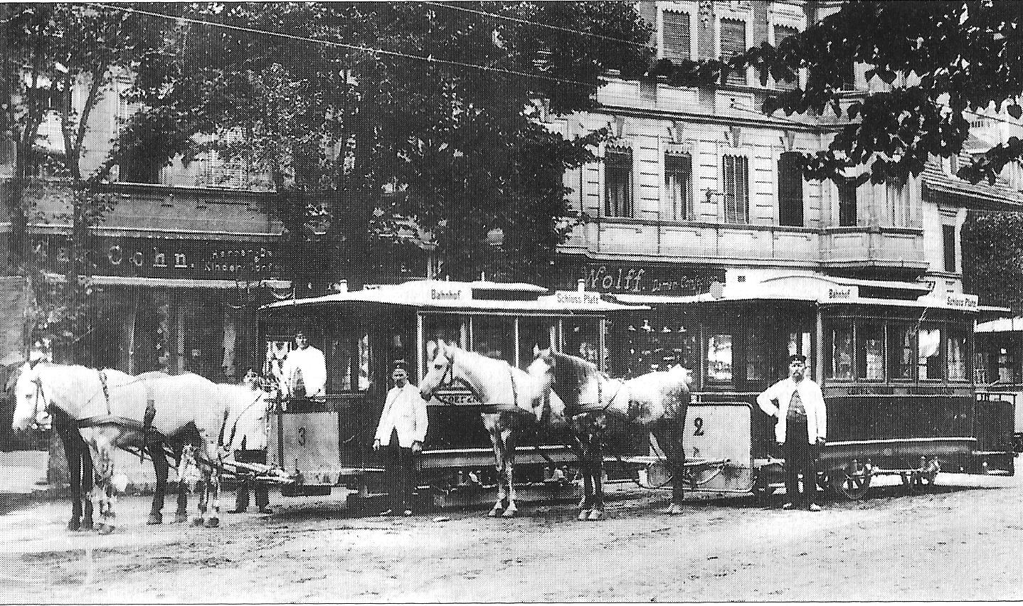 Wagen 2 und 3 der Cöpenicker Pferdebahn kurz vor der Umstellung auf elektrischen Betrieb